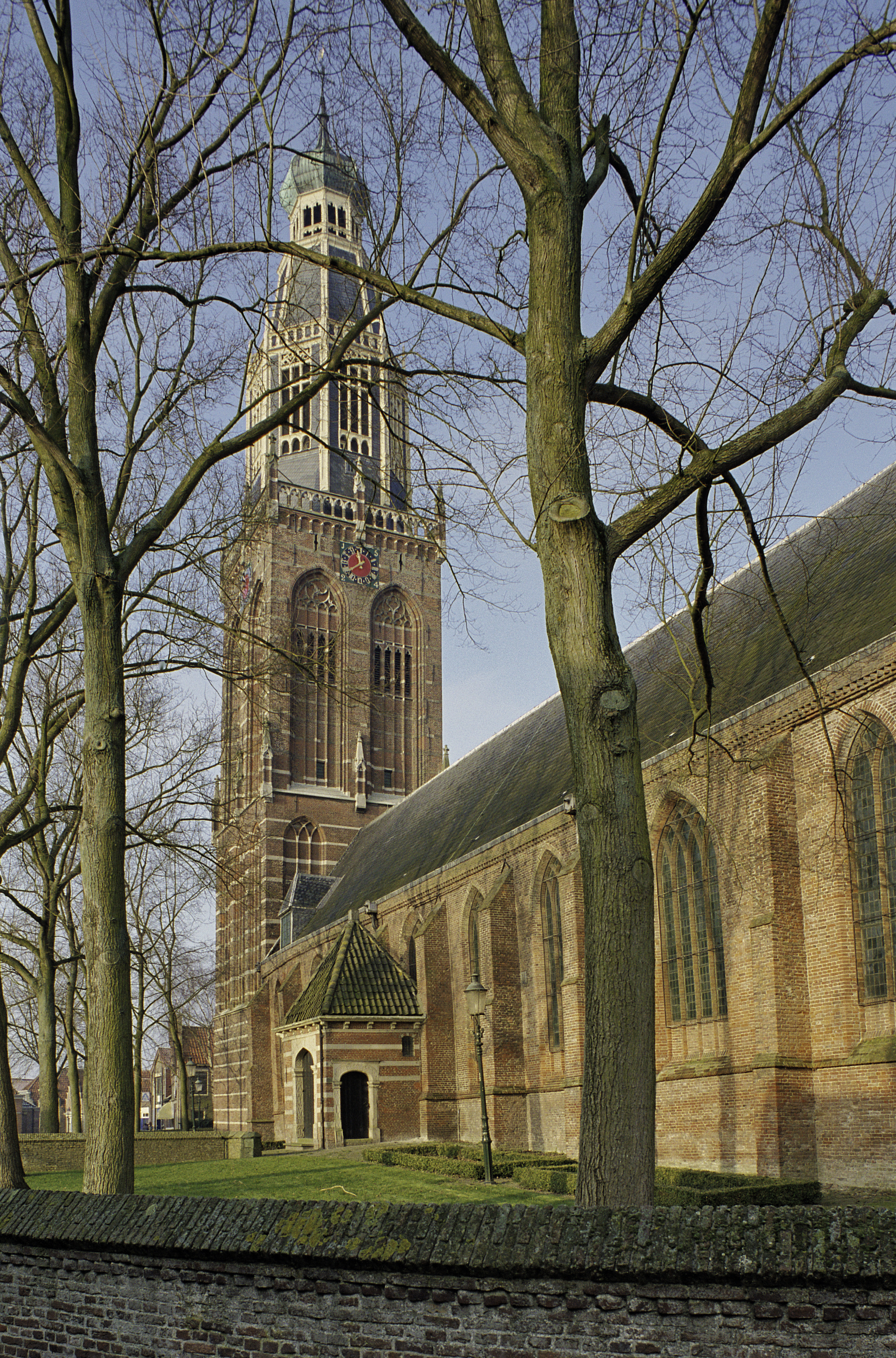 Zuiderkerk: Overzicht van de kerk gezien vanaf de oostzijde (opmerking: Kanjers 2001)